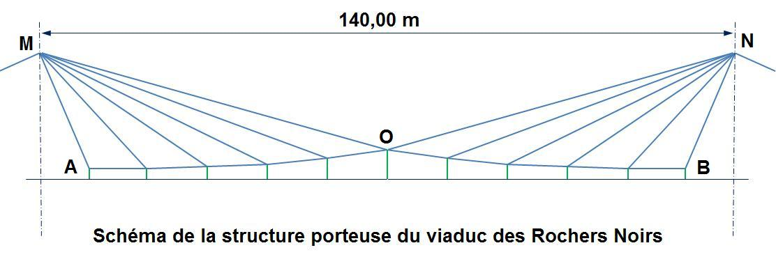 Schéma de la structure porteuse du viaduc des Rochers Noirs